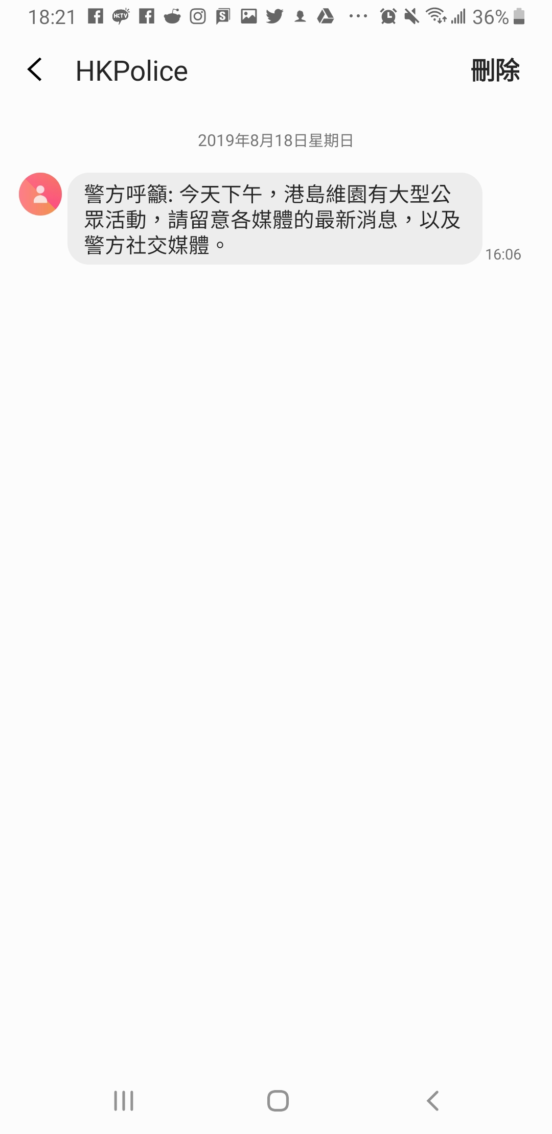 中文（香港）: 2019年8月18日香港反對逃犯條例修訂草案集會前夕收到的警方訊息。手機型號：Samsung Galaxy A6+